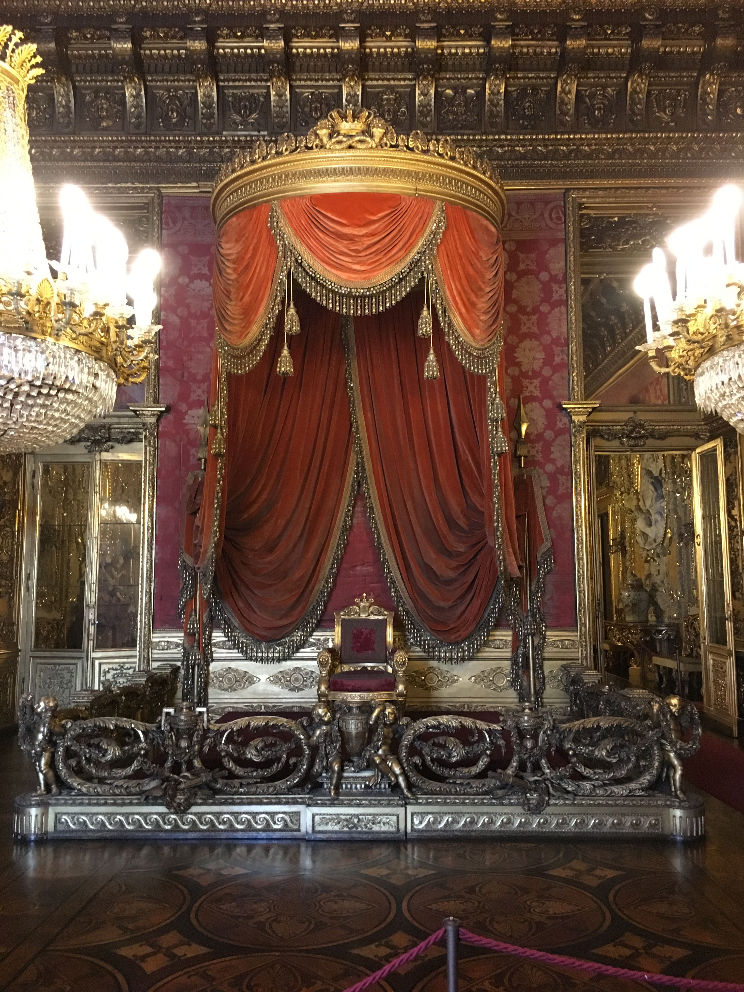 Sala del trono.Palazzo reale Torino